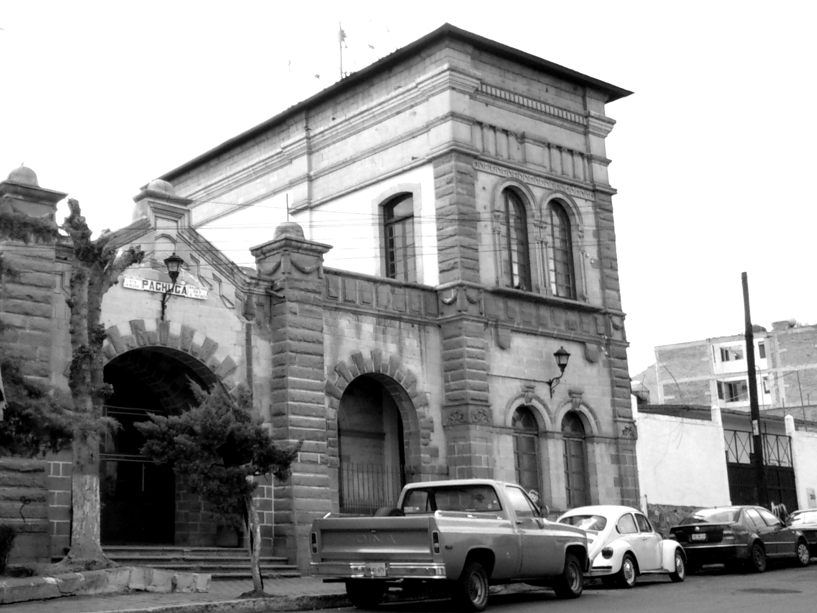 Estación Pachuca "El Mexicano"